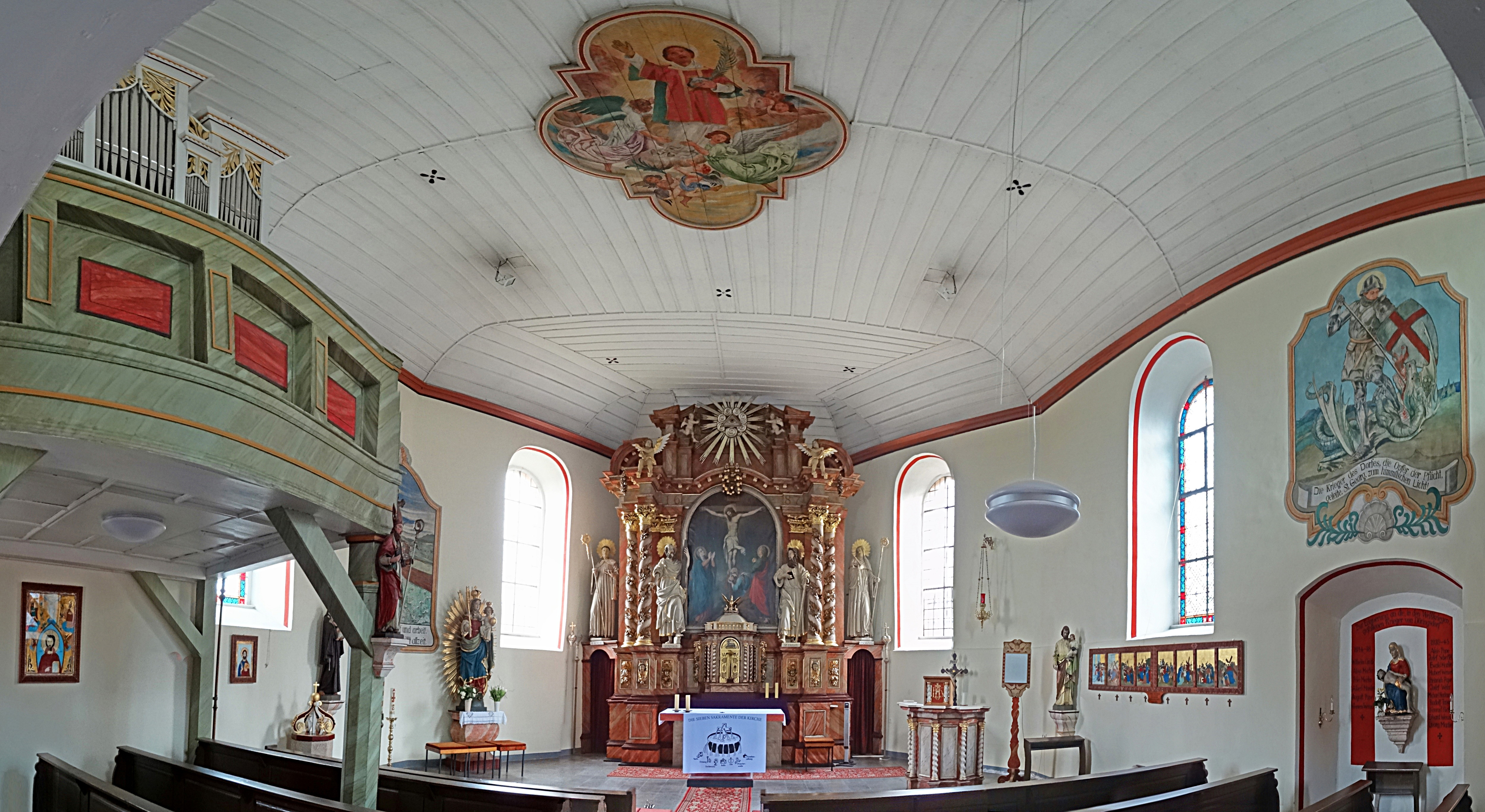 Innenraum Panorama St. Stephanus (Döringsdorf)